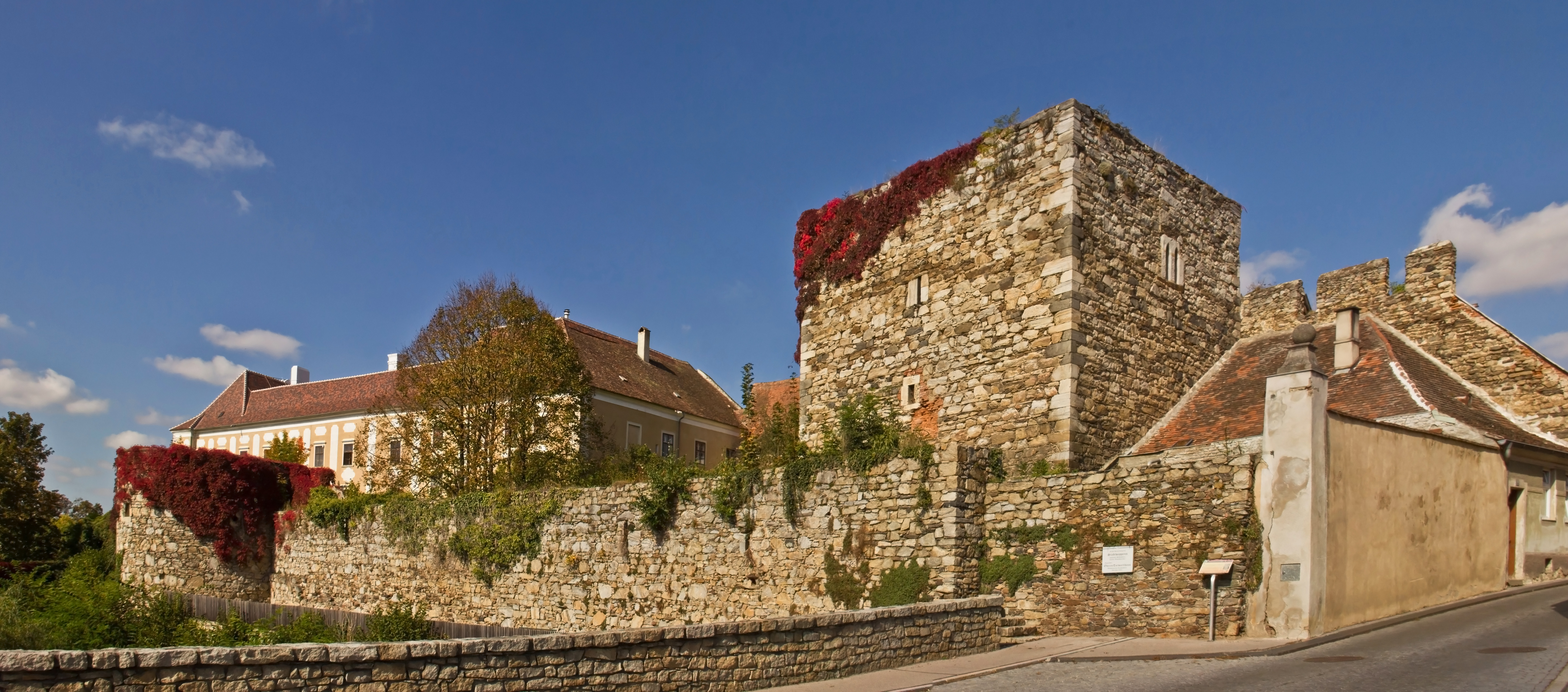 Die Stadtbefestigung von Drosendorf (hier die Südseite) ist die einzige noch vollkommen geschlossene Stadtmauer Österreichs. Sie umgibt die Altstadt auf einer Länge von 1750 m.